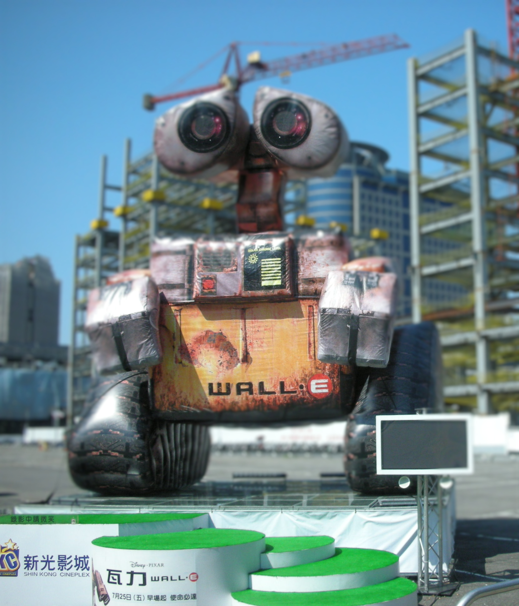 新光影城展示《瓦力》氣球。